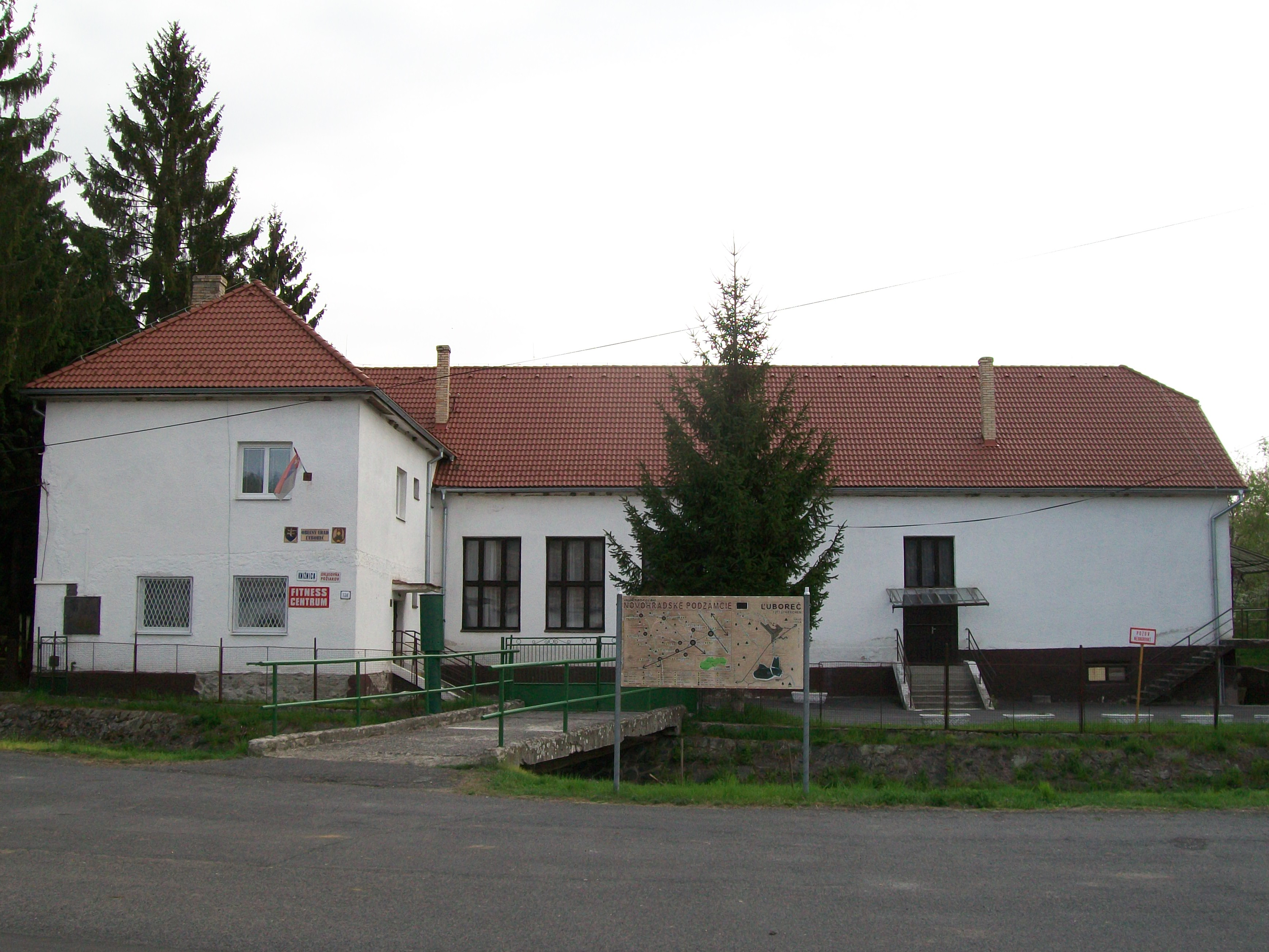 Obecný úrad v Ľuboreči